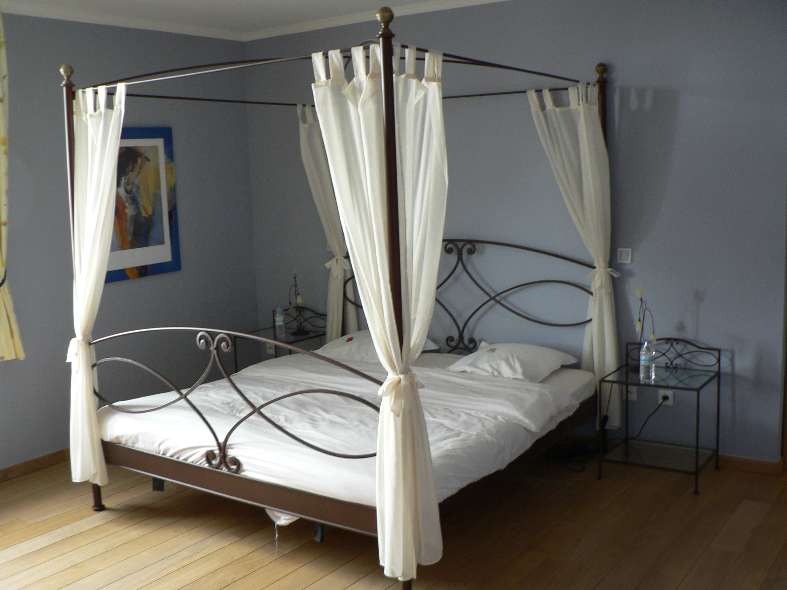 Bed and Breakfast "Ma Résidence", suite "Romantique", Tellin, Belgium - own picture